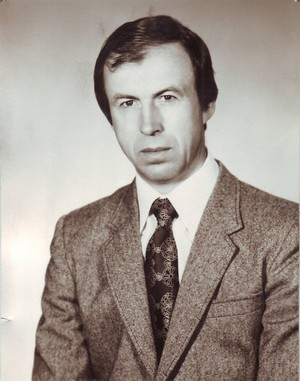 Václav Vavřík, ředitel Gymnázia v Kadani v letech 1986 až 1990